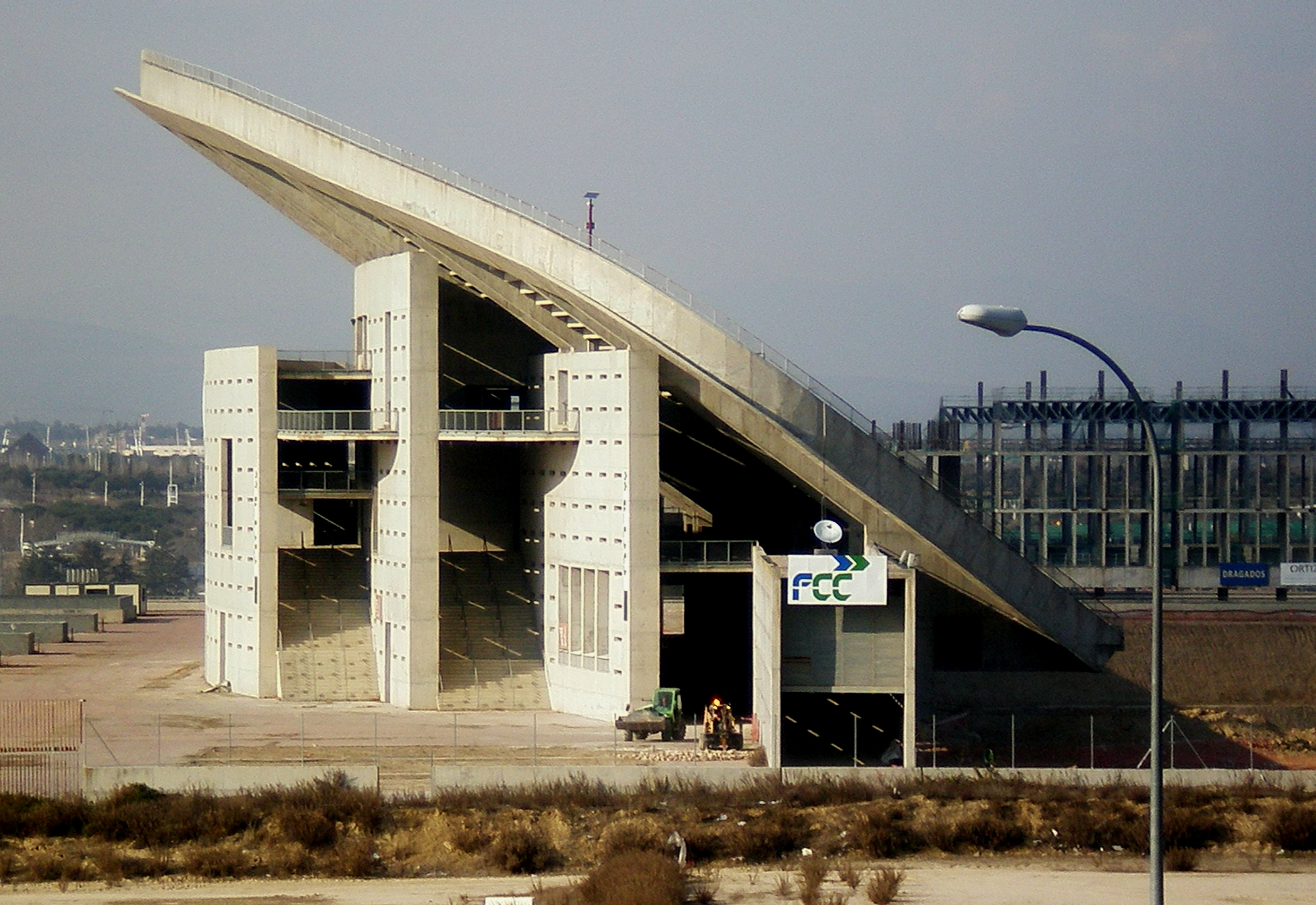 Panoramica del Estadio Olimpico de Madrid